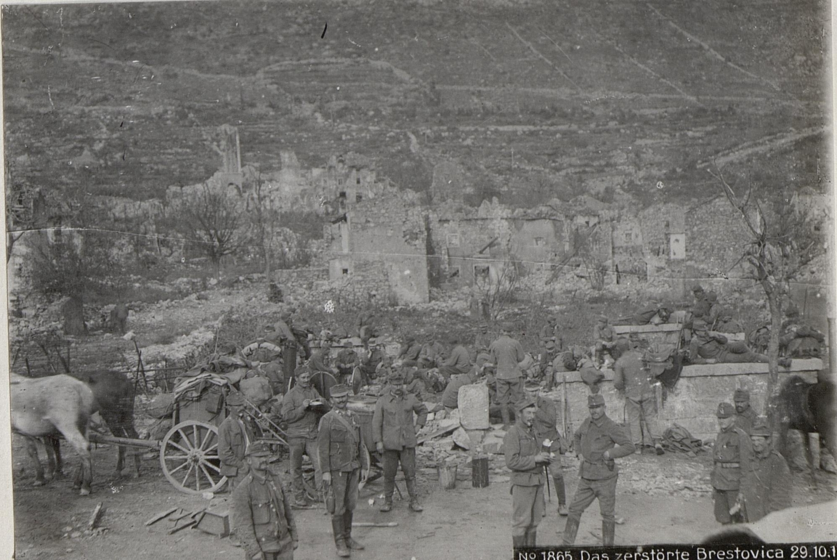 Das zerstörte Brestovica 29.10.17.